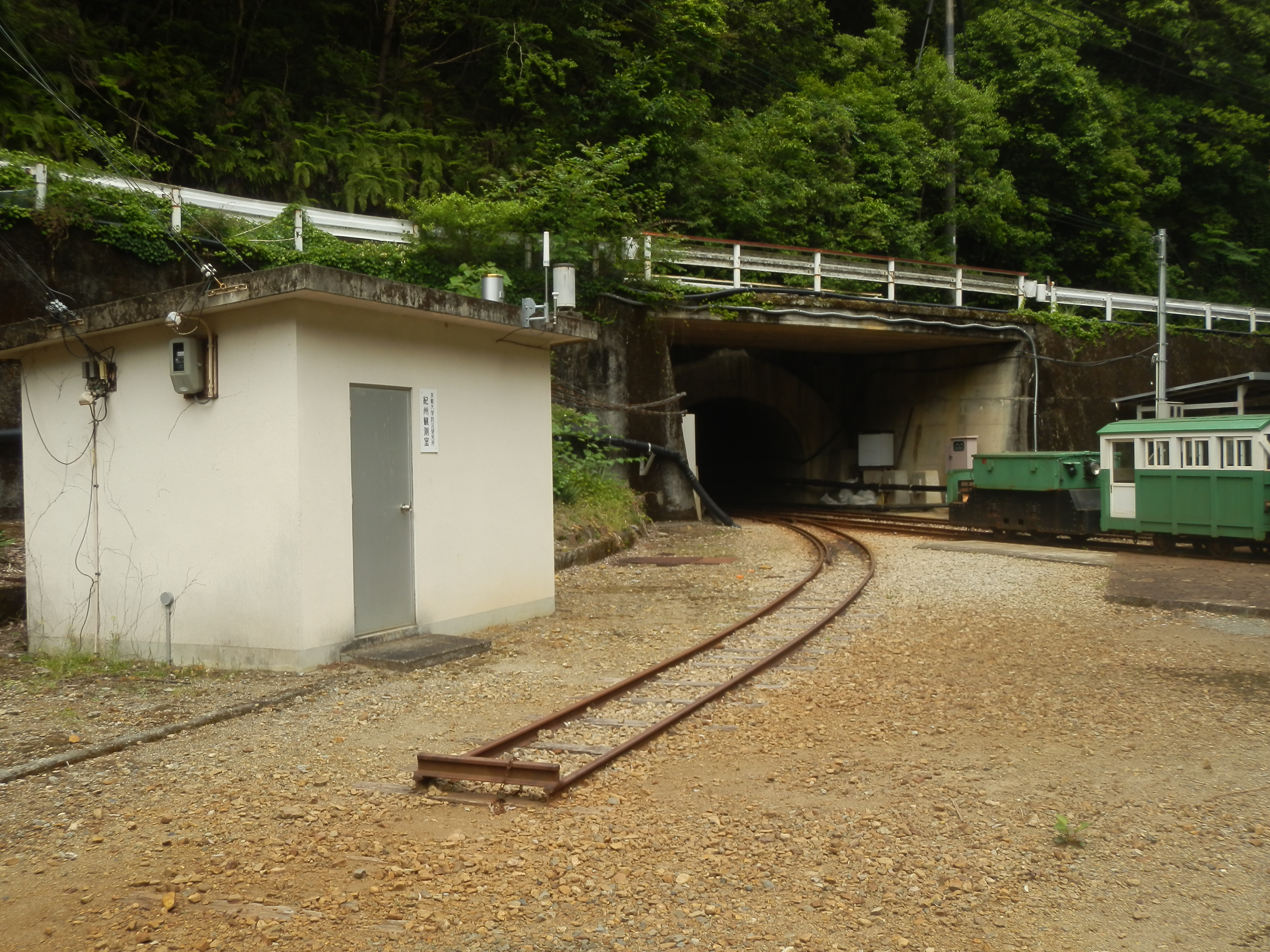 防災科学技術研究所が運用する広域地震観測網(F-net)の三重県熊野市にある観測点（通信機器などが納められた小屋）。右に写るのは湯ノ口温泉へアクセスするためのトロッコ列車で、もともとは鉱山であり、観測機器は坑道内に設置されている。ここで観測された地震情報は東海道新幹線の緊急停止用にも使われている。